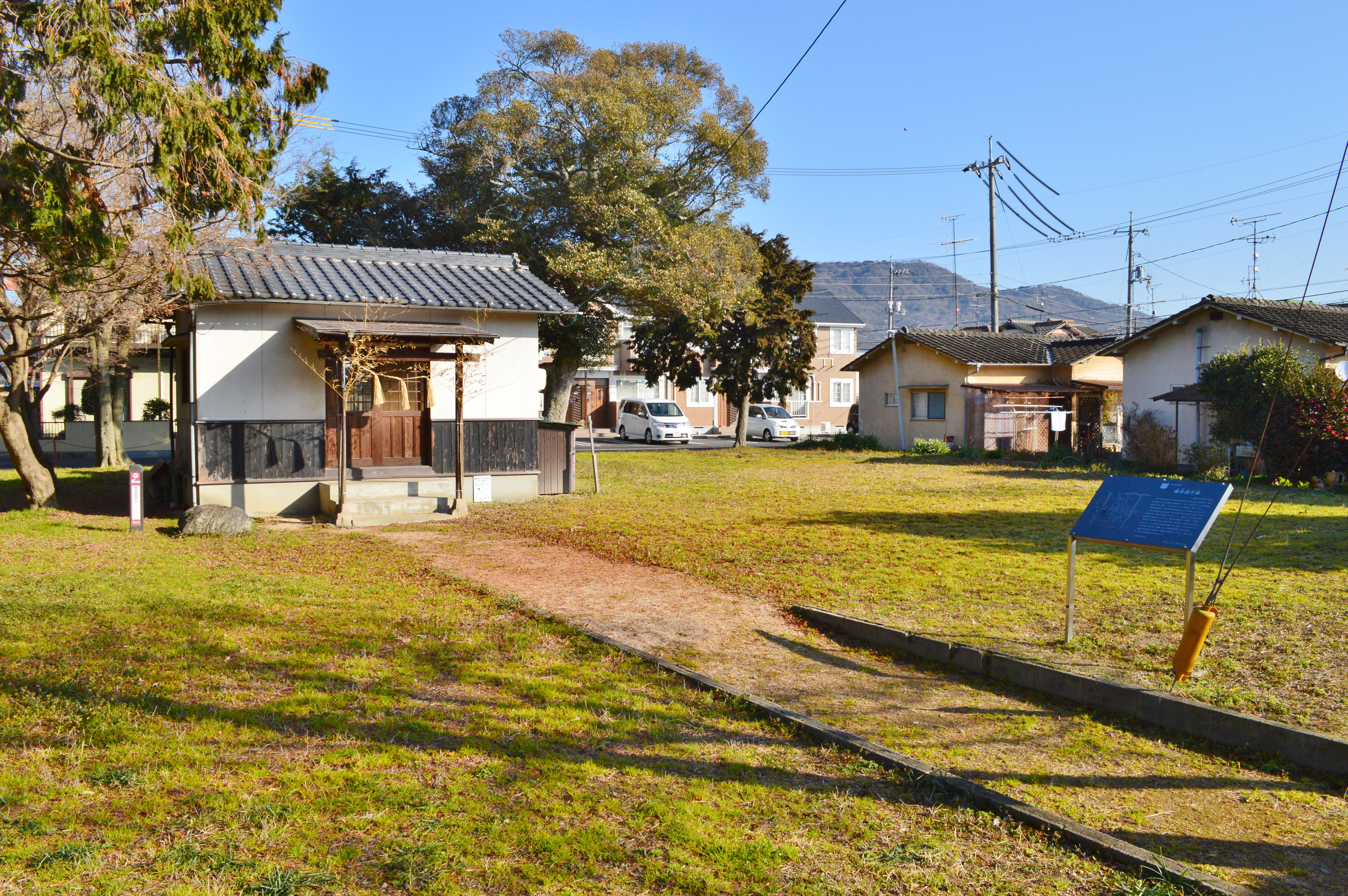 備前国庁跡 概観 Nikon D3200